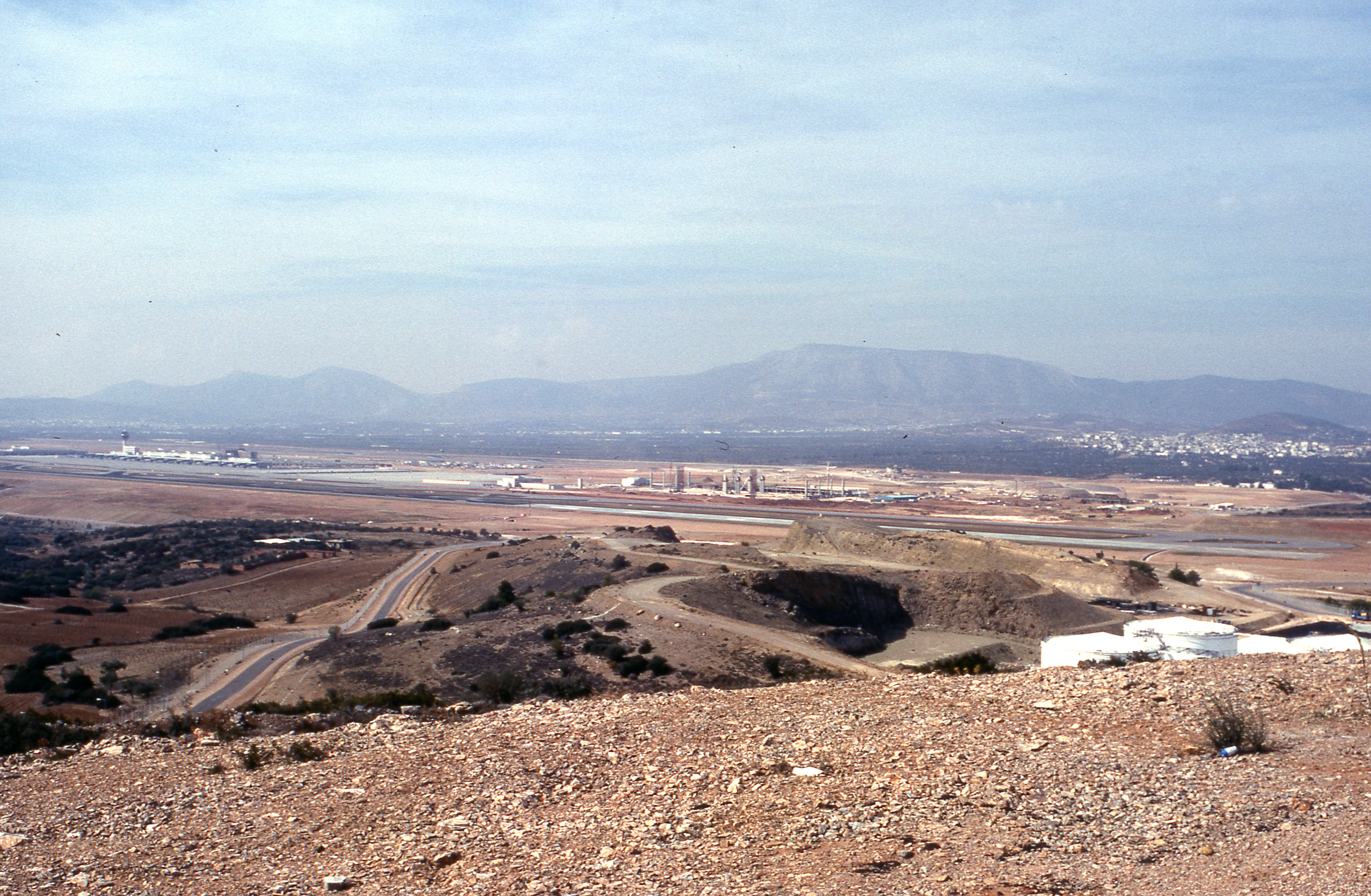 Aéroport international d'Athènes Elefthérios-Venizélos